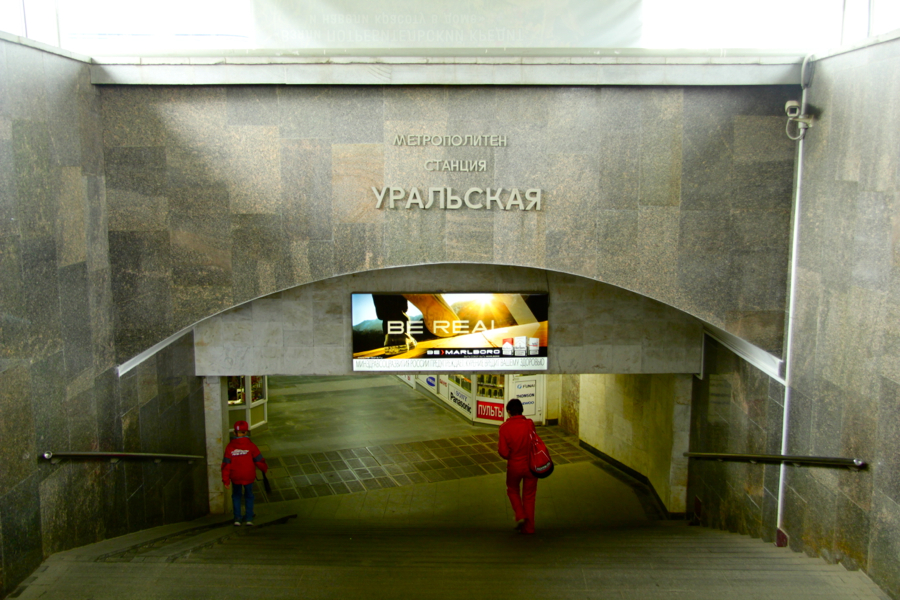 Yekaterinburg Metro (Екатеринбургский метрополитен)